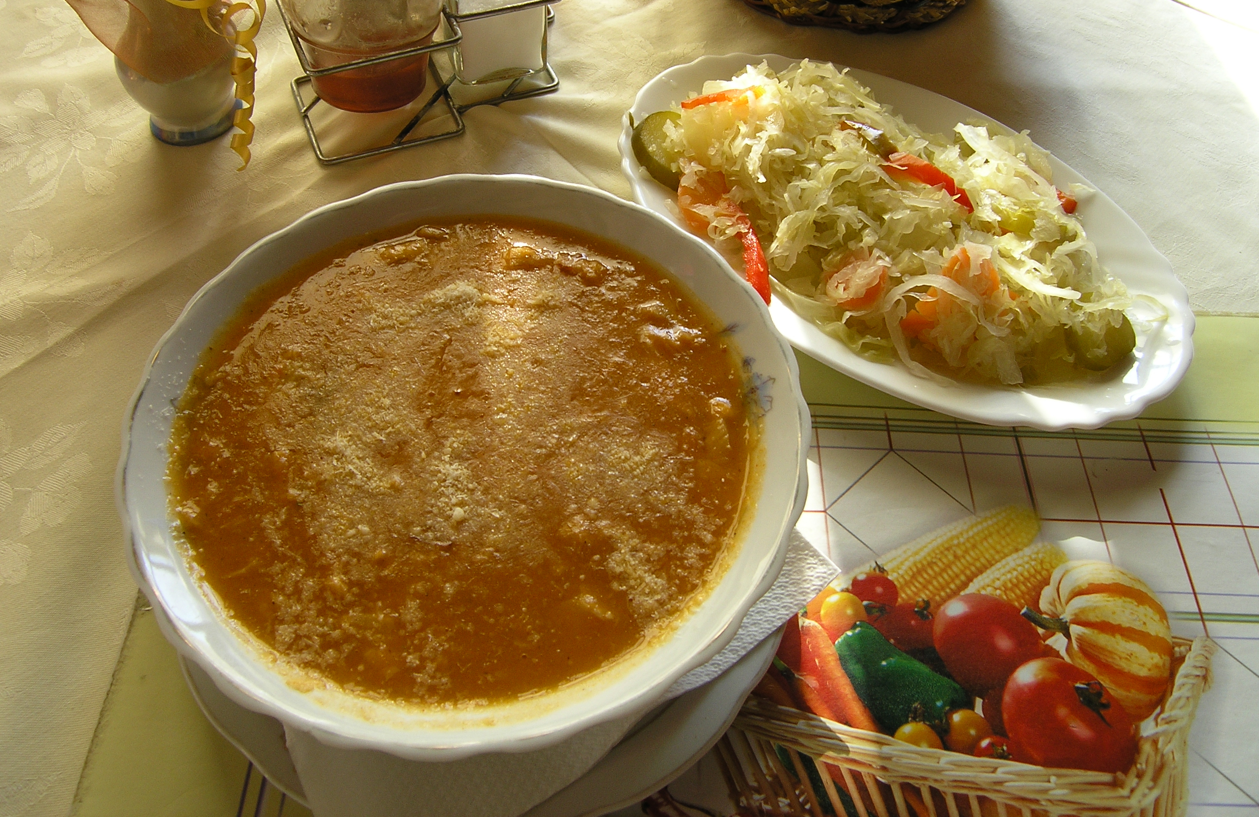 Vampi i kisela salata. Menu iz Kozarske Dubice.